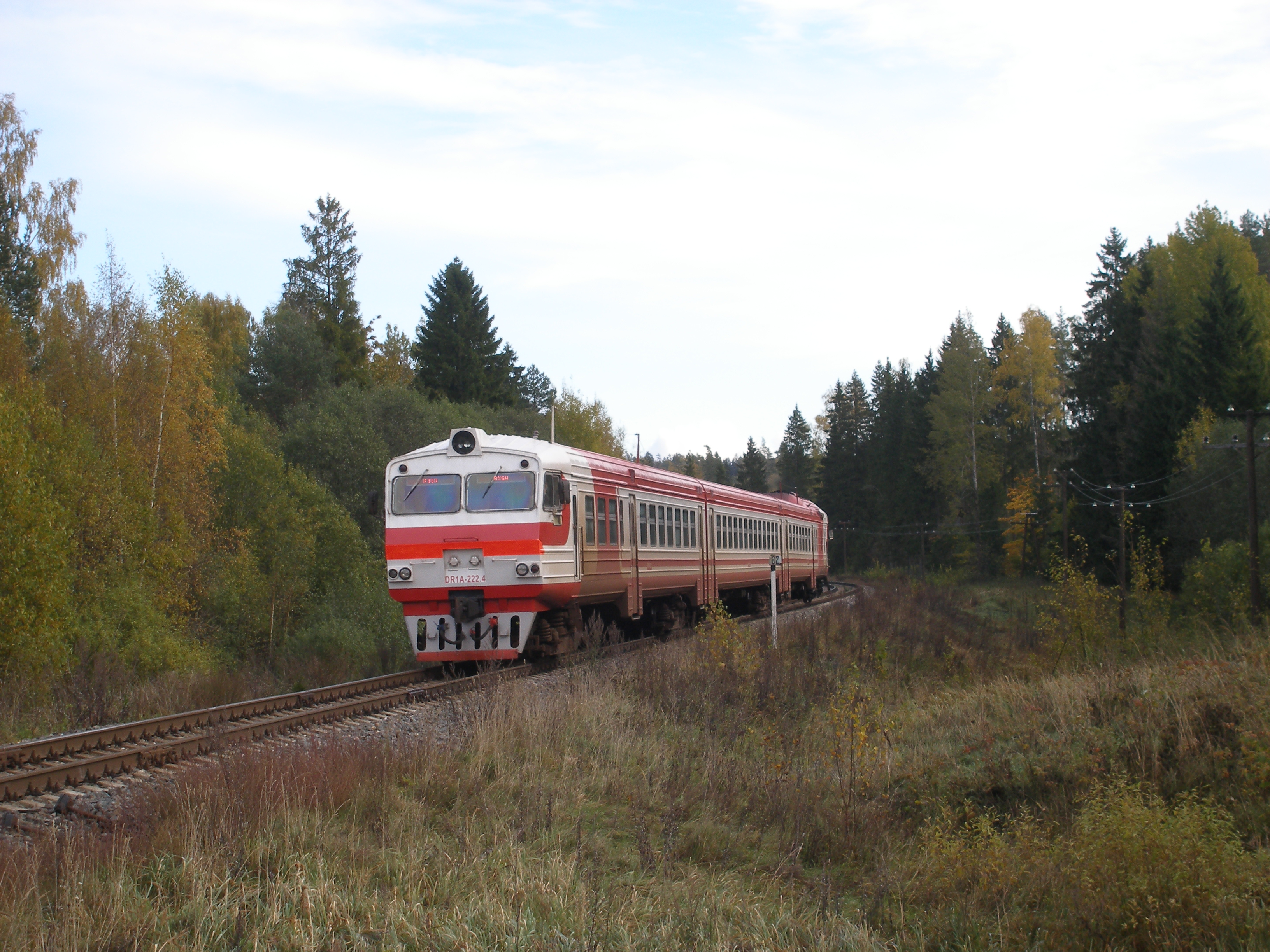 Dīzeļvilciens DR1A Valka - Rīga posmā Melturi - Āraiši.